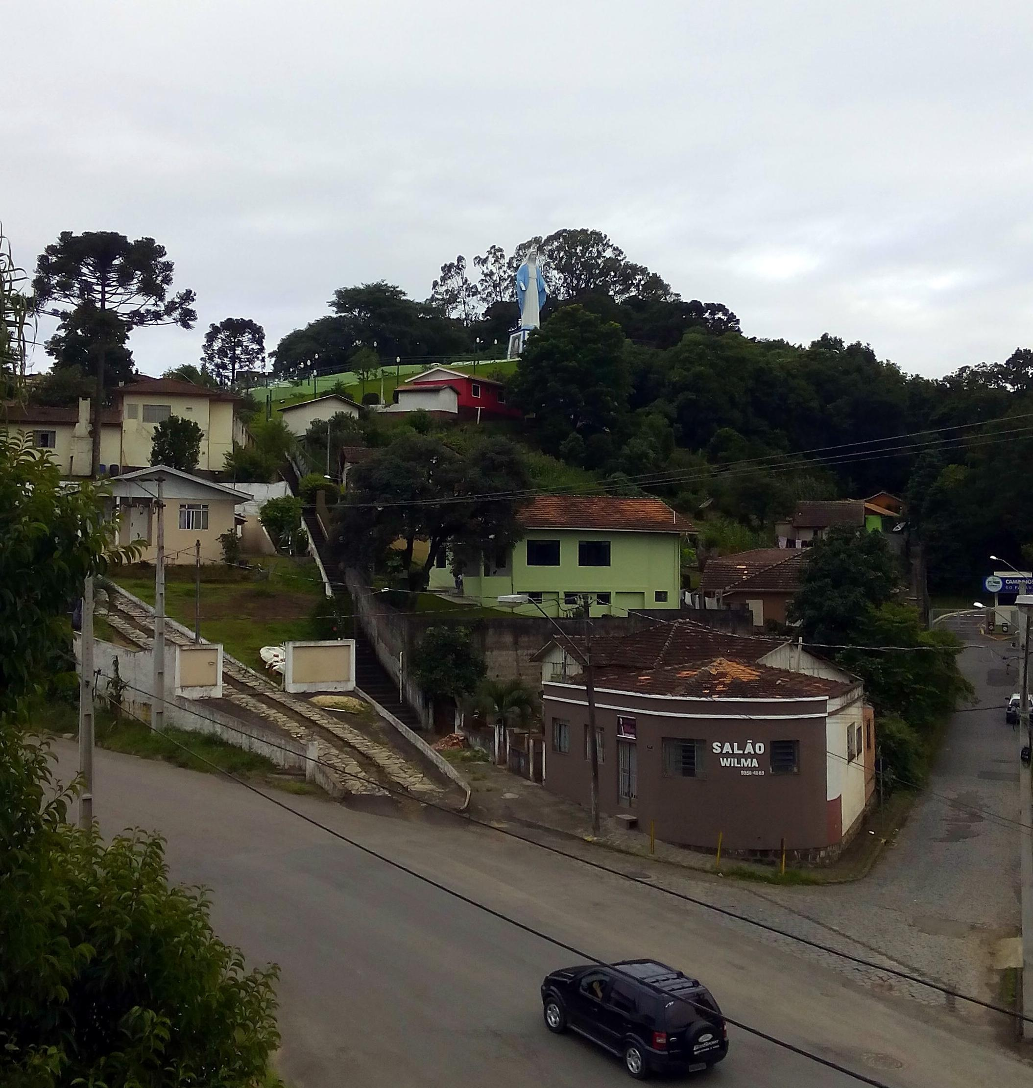 Estatua de la virgen de Nossa Senhora das Graças, con 22 metros, es la más grande del mundo en su tipo.